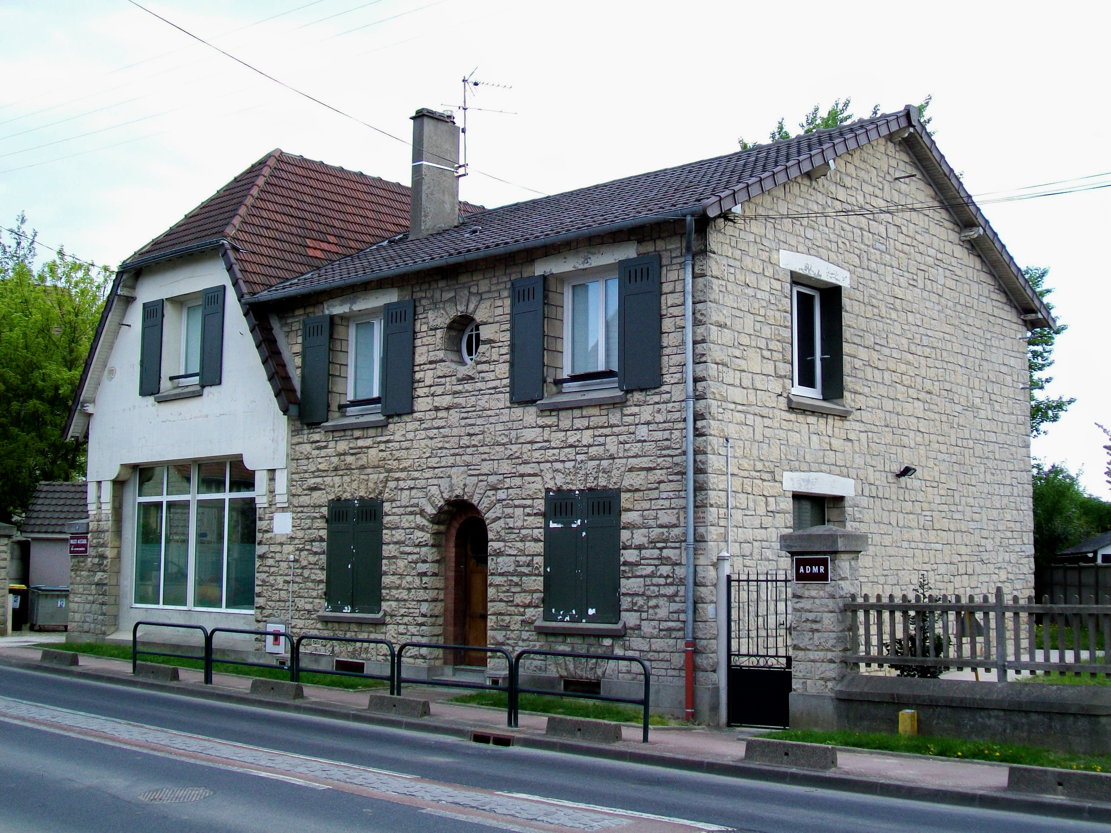 L'ancien centre de la Saint-Quentinoise, rue de la gare, où travaillait Gaston Fouliouse. C'est aujourd'hui la halte-garderie.